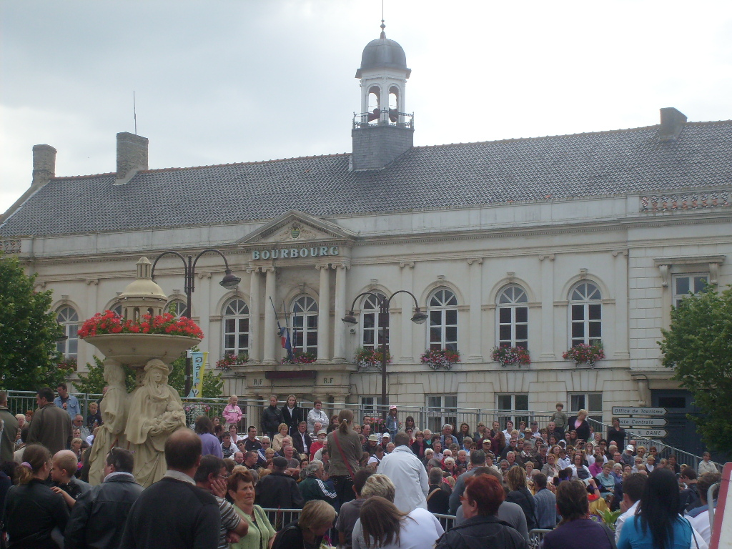 Mairie de Bourbourg lors de la fête de Gédéon